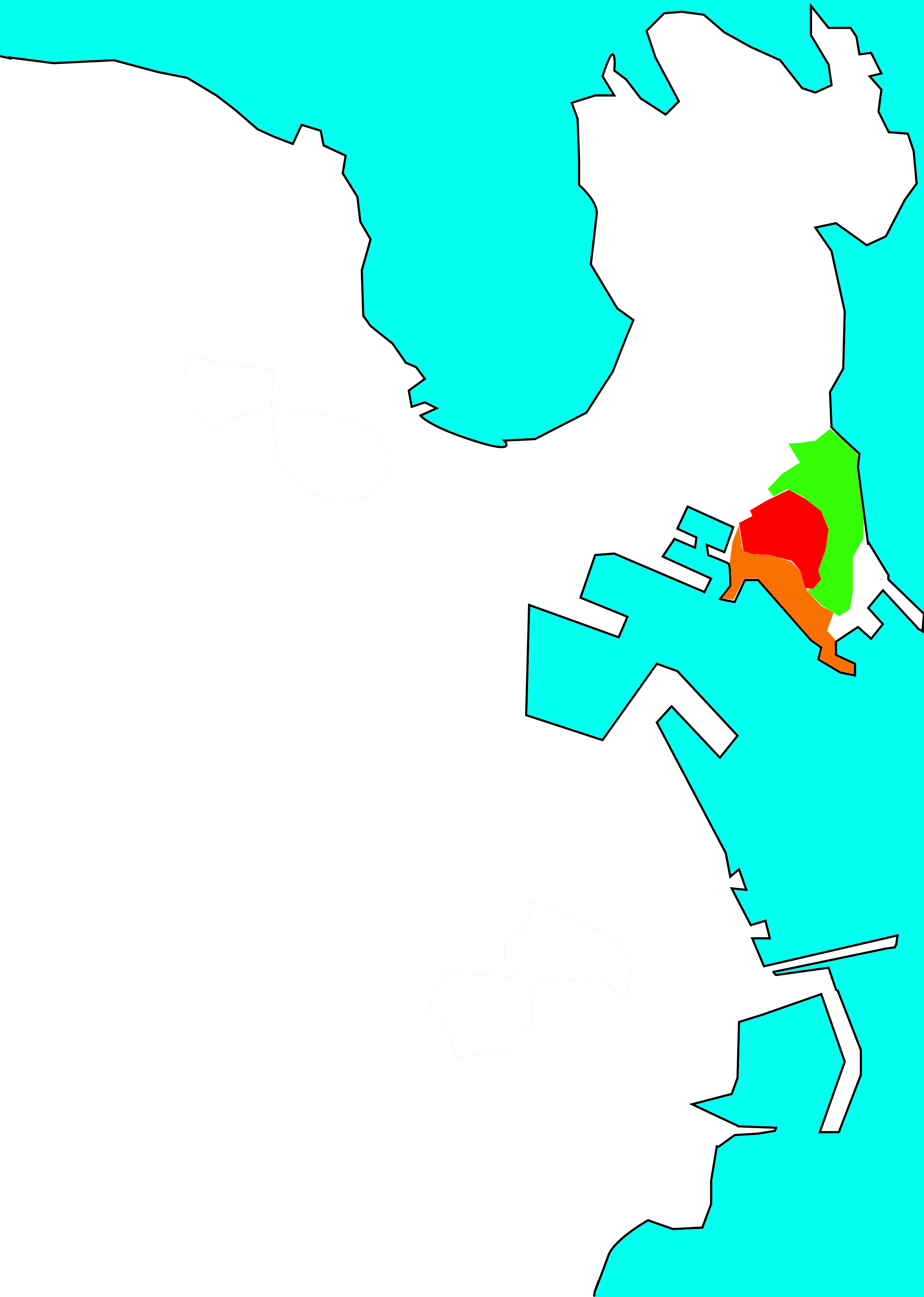 Situación da Cidade Vella (vermellos) no concello da Coruña, segundo En verde, A Maestranza e en laranxa O Parrote